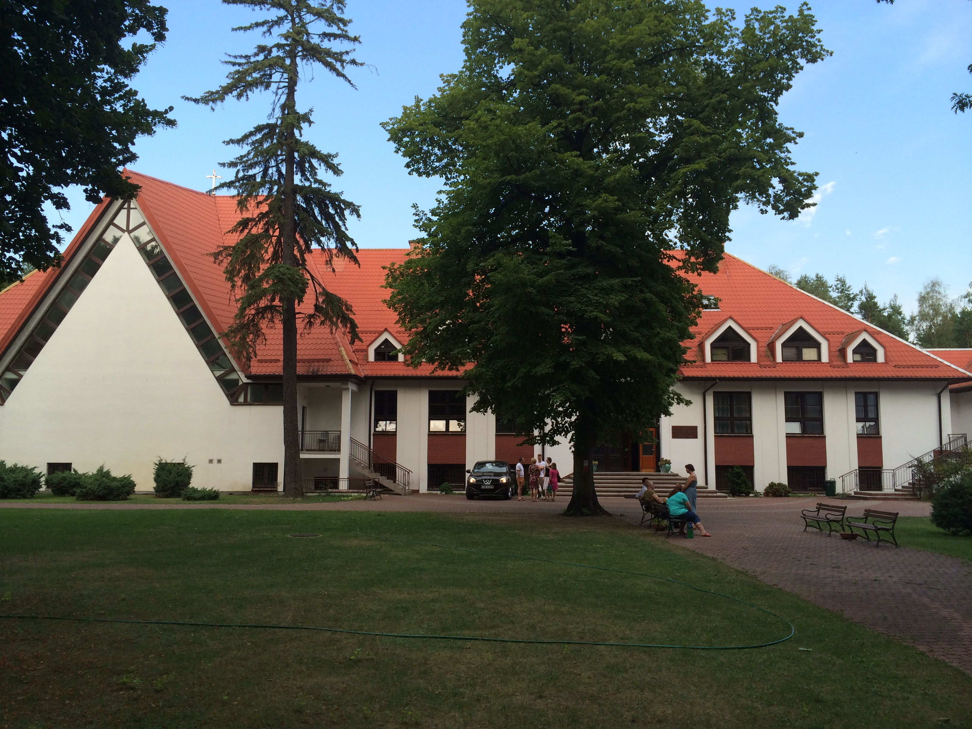 Gmachy Wyższego Baptystycznego Seminarium Teologicznego w Warszawie